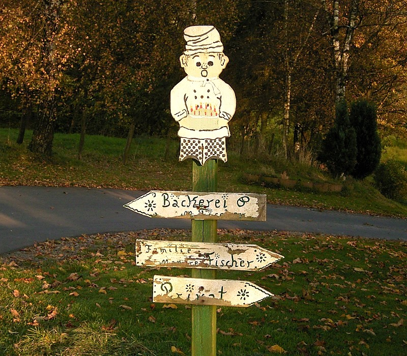 Radevormwald